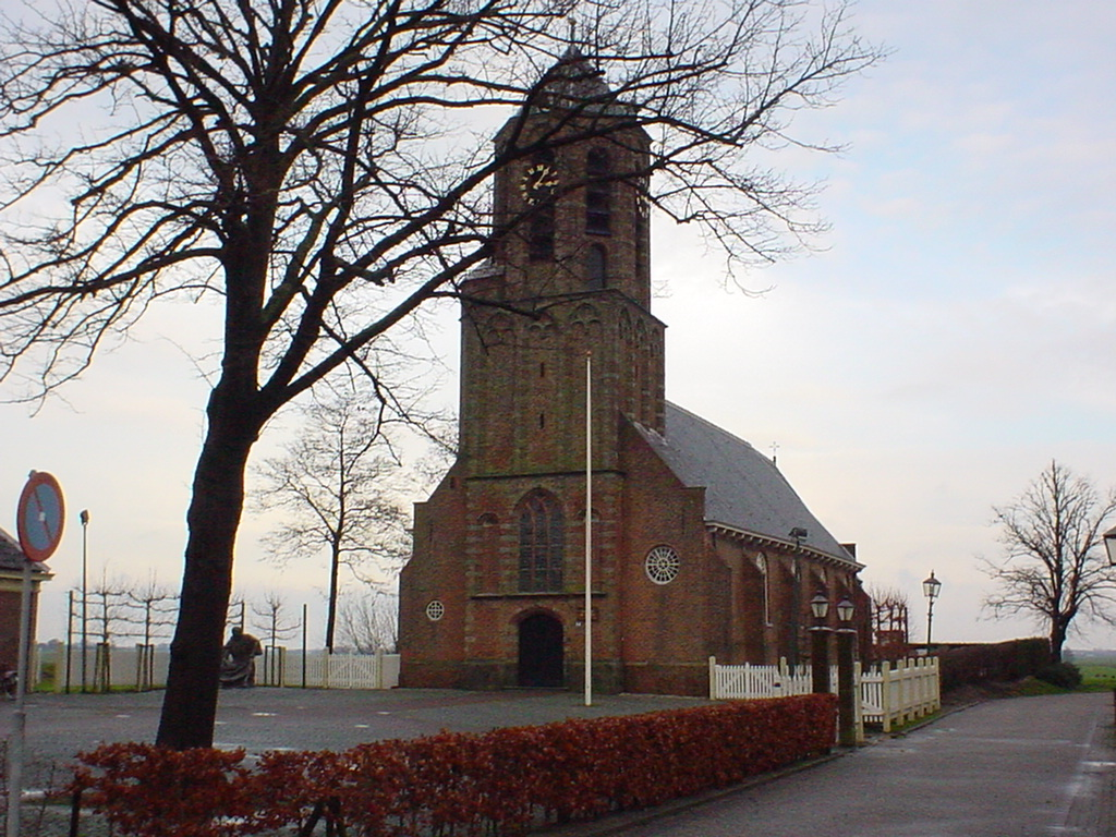 Kerkgebouw van de Protestantse Gemeente te Rijnsaterwoude.